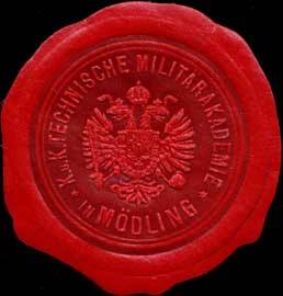 Sealing stamp Title: K.u.K. Technische Militärakademie in Mödling Description: rot, geprägt Place: Mödling size: 5 cm